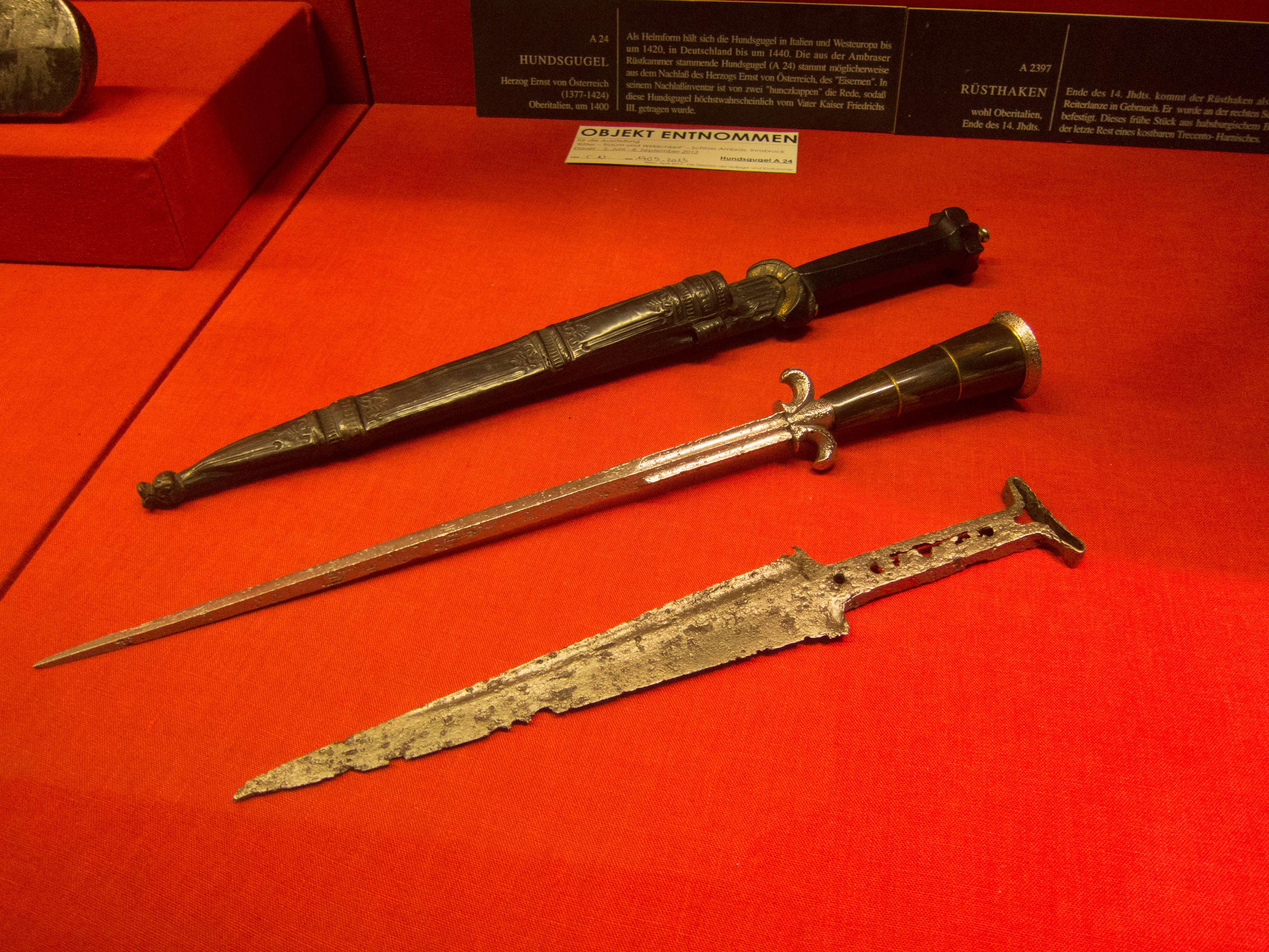 Vienna, Austria, 2013